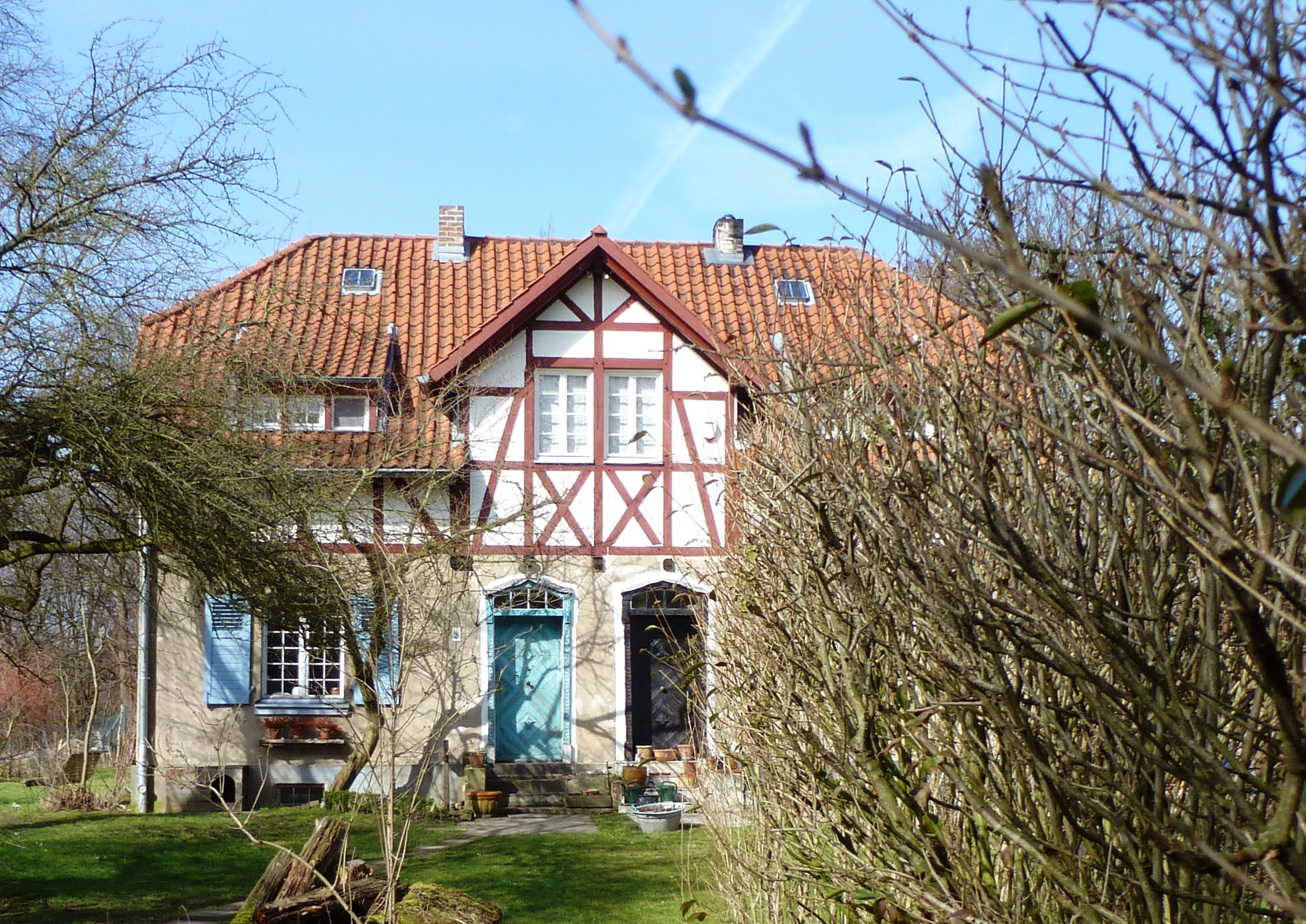 Haus Mielenforster Kirchweg 8 in Köln-Dellbrück, ehemaliges Gesindehaus von Gut Mielenforst This is a photograph of an architectural monument.